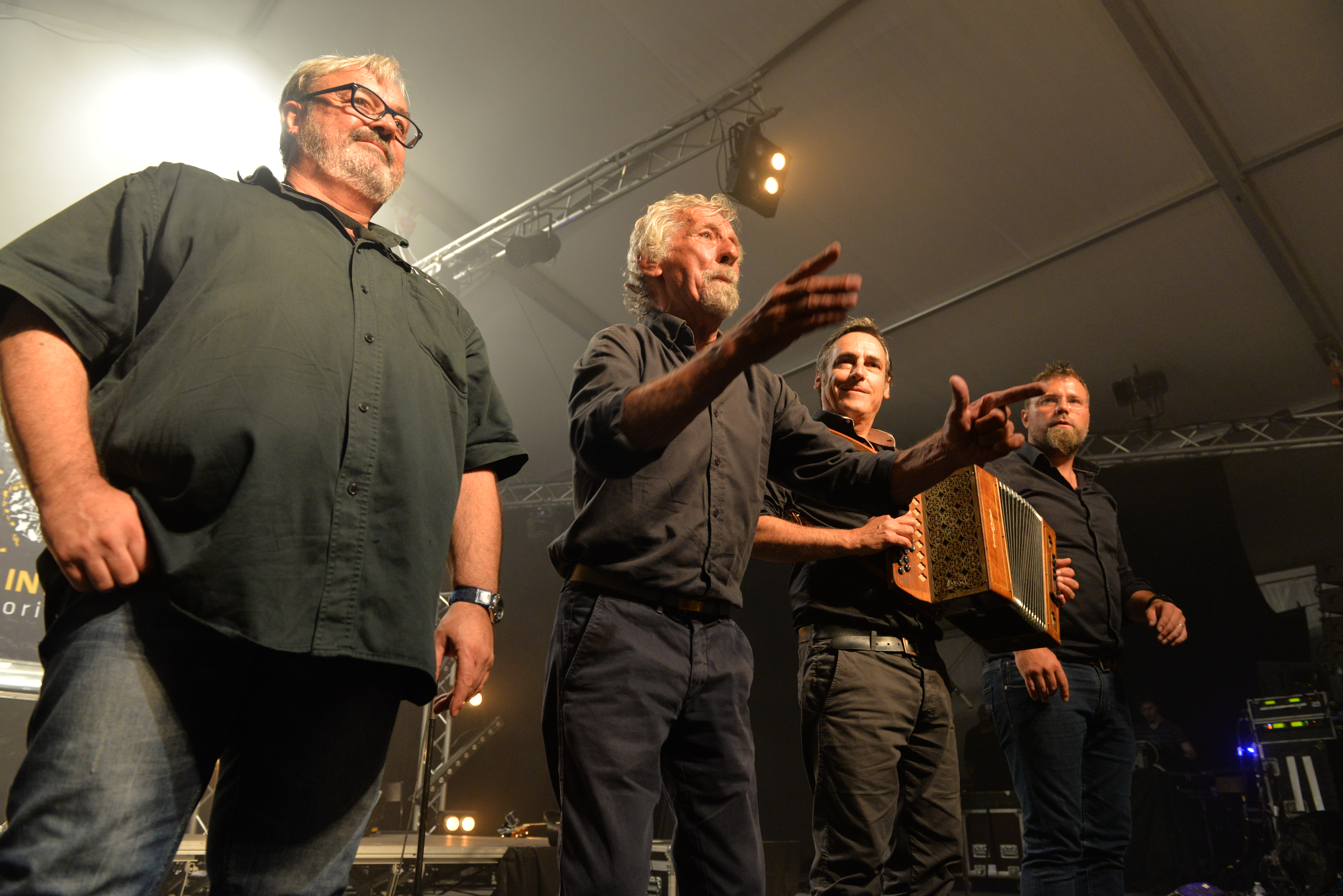 Festival interceltique de Lorient d'août 2016 - Concert final du groupe breton Djiboudjep - Quai de la Bretagne